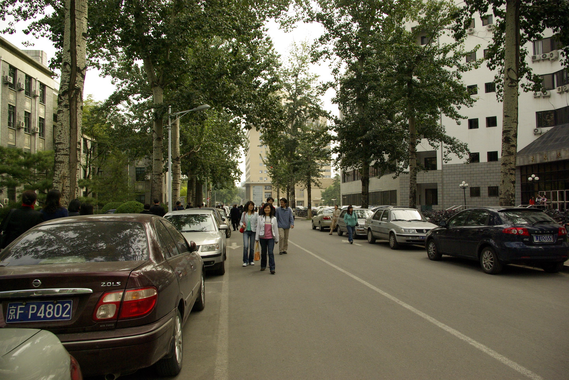 road - in Beijing